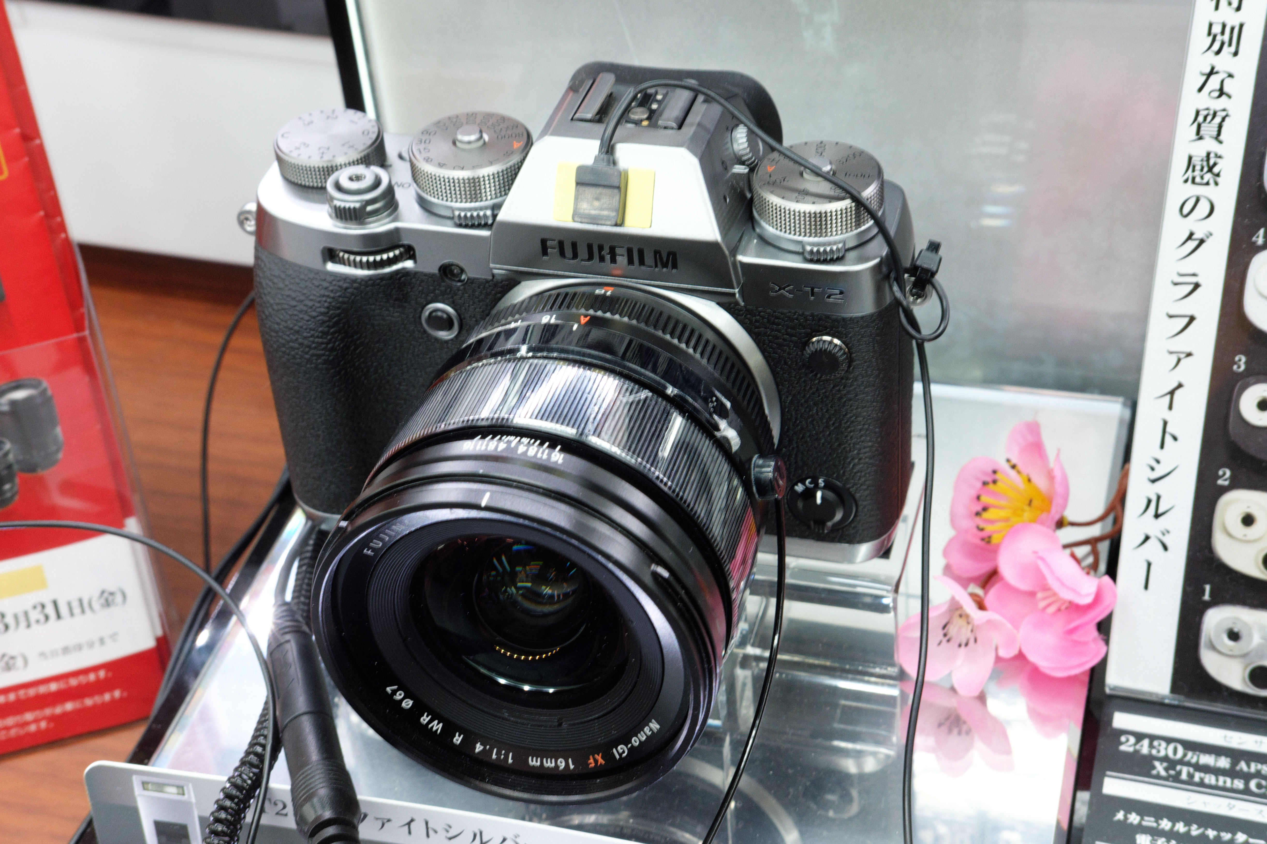 FUJIFILM X-T2 グラファイトシルバーエディション（ヨドバシカメラにて撮影）